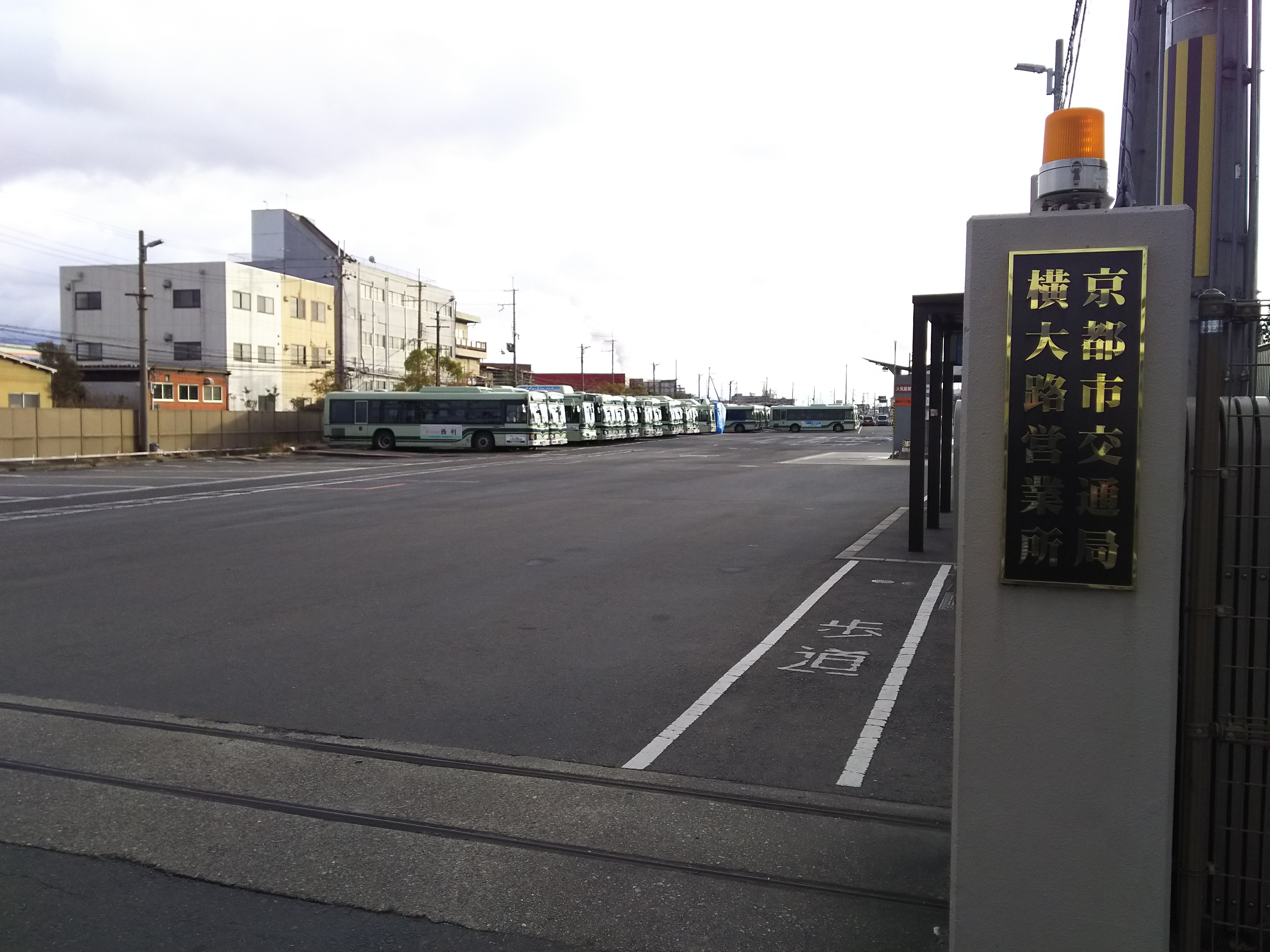 京都市営バス横大路車庫（京都市伏見区）